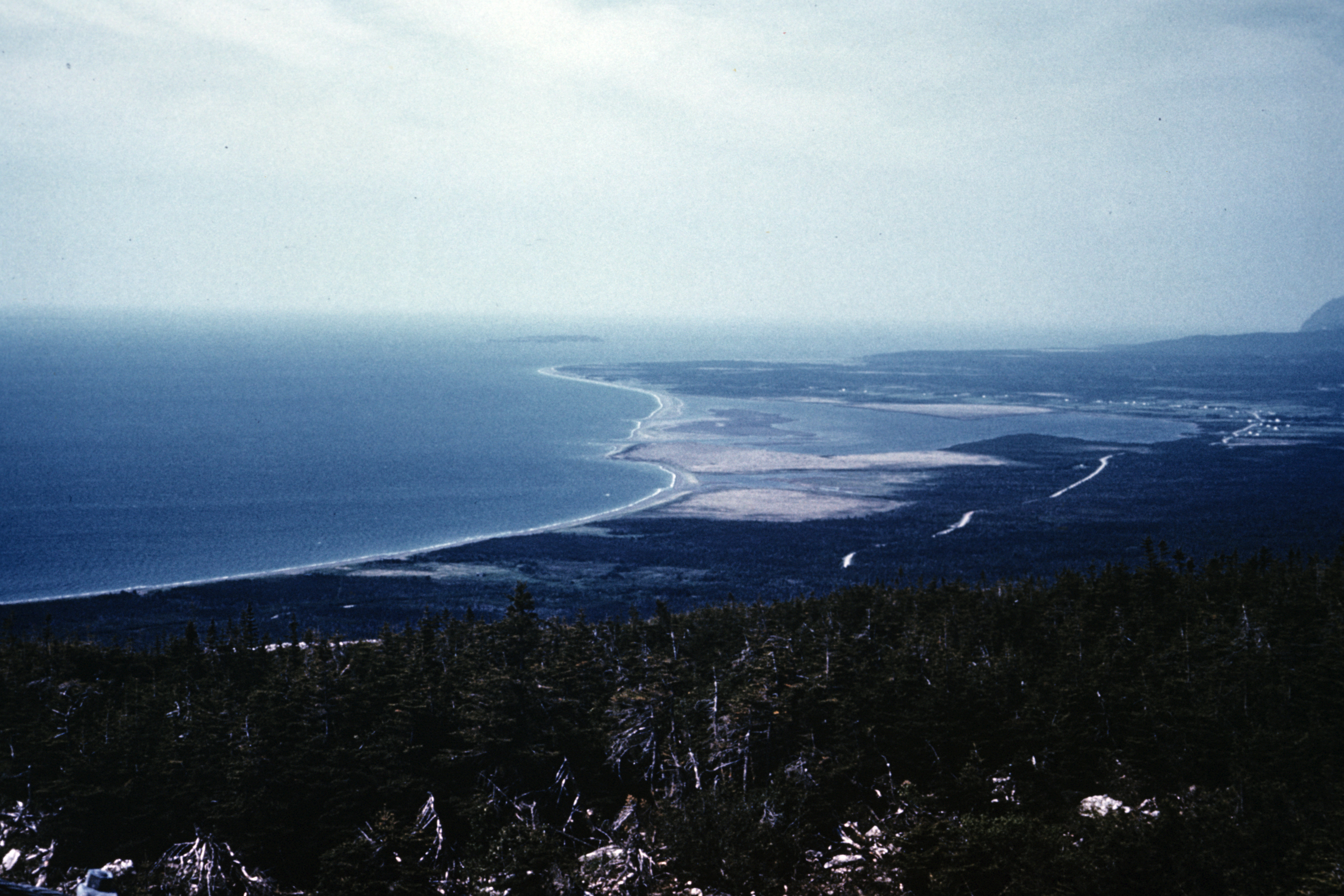 Port aux Port penninsula